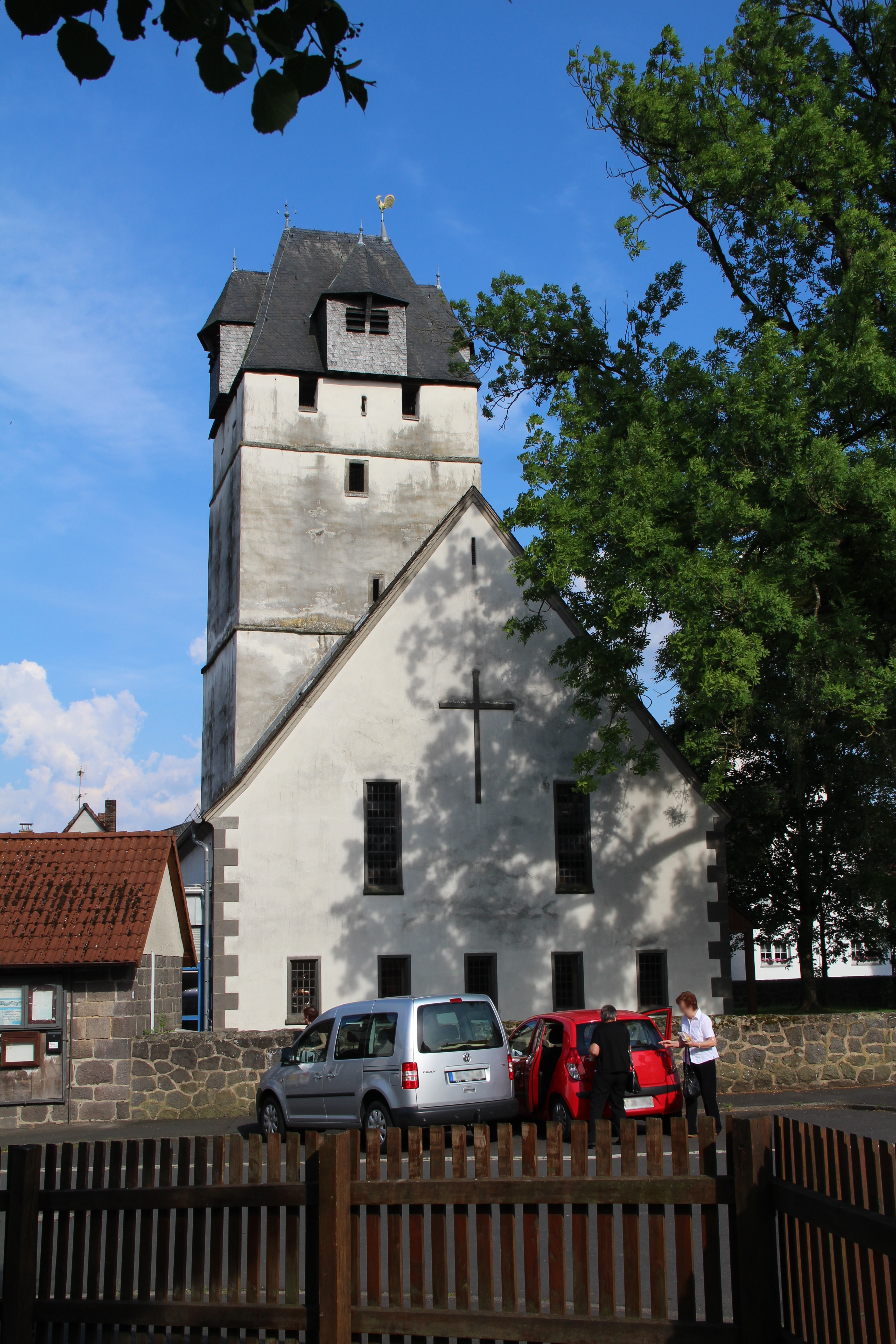 Evangelische Kirche von Westen